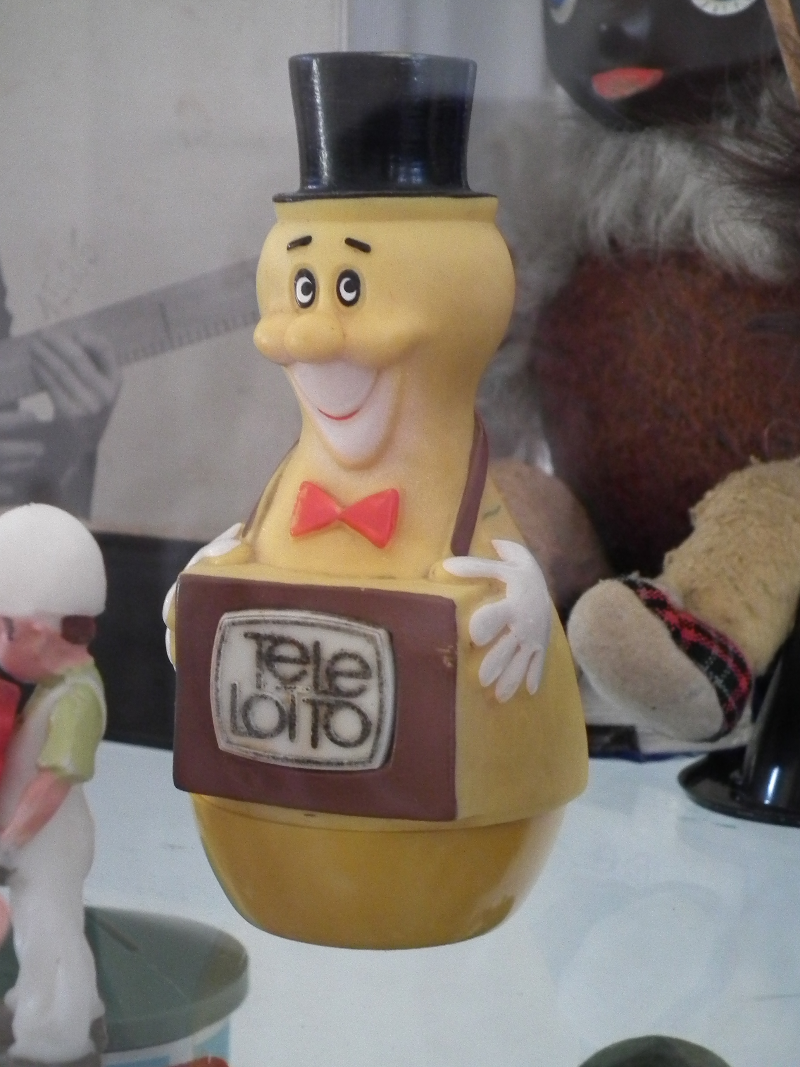 2020-01-25 Barockschloss Rammenau, Sonderausstellung Erinnerungen aus Blech und Plaste - Modellspielzeug aus der DDR